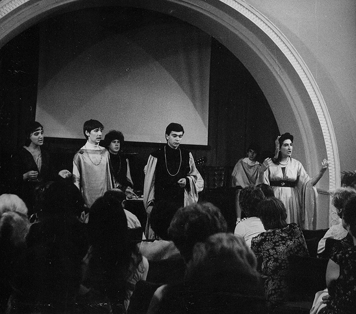 Выступление ансамбля старинной музыки Musica Rediviva в Центральном доме работников искусств в 1983 году Татьяна Суворова, Дмитрий Ключев, Сергей Пугачёв, Евгений Тулинов, Евгения Полина